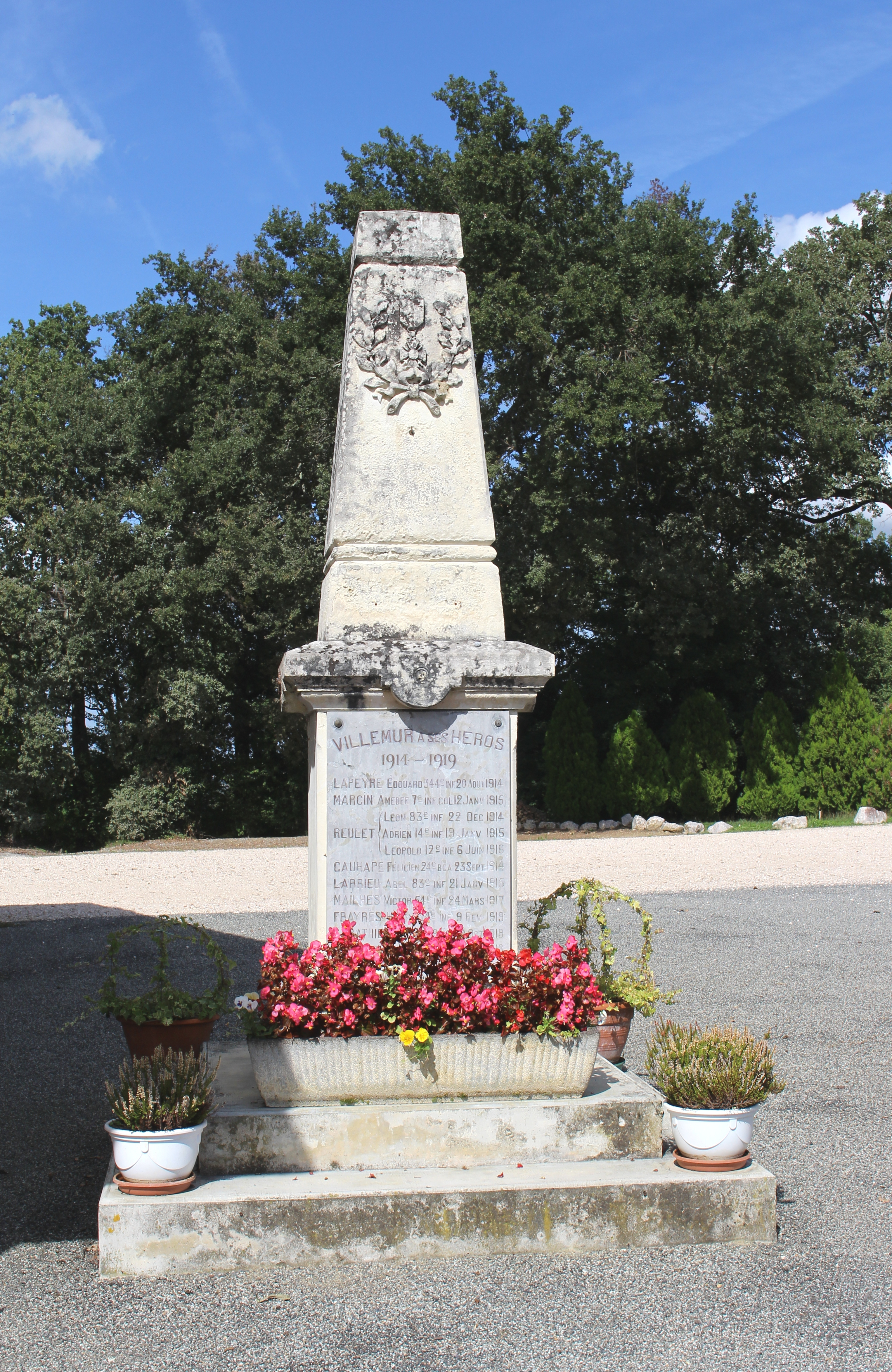 Monument aux morts de Villemur (Hautes-Pyrénées)